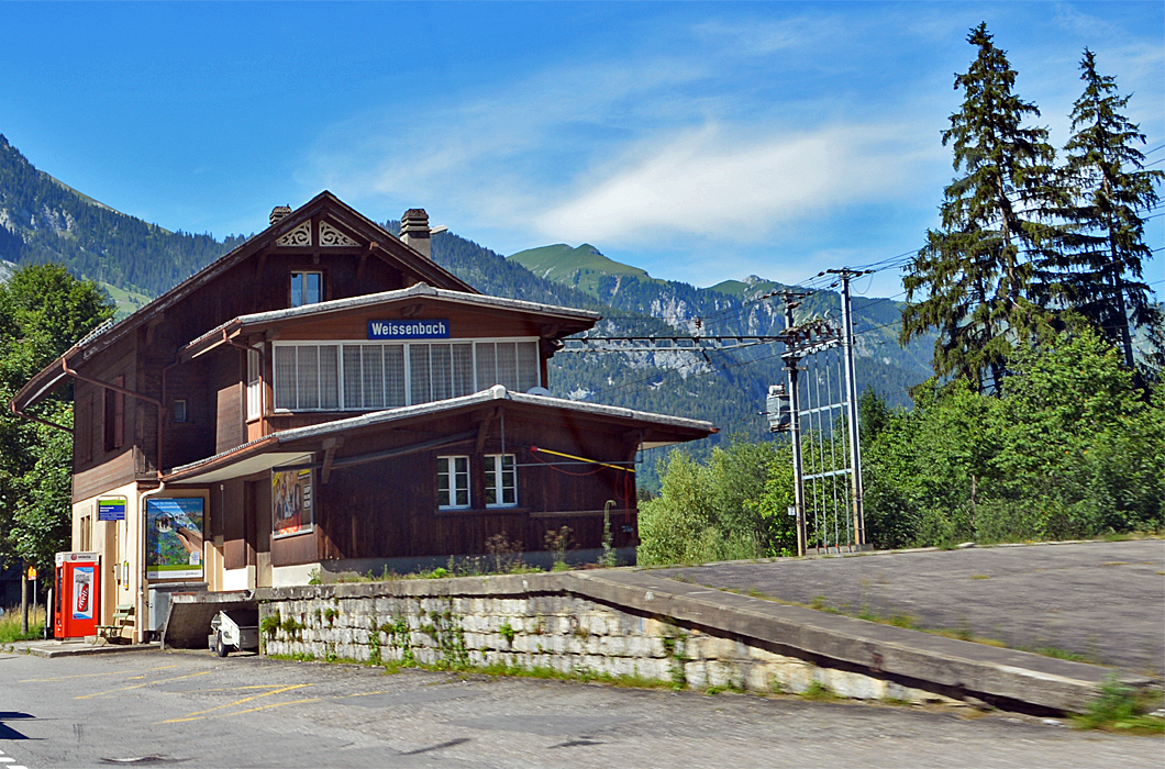 Bahnhof von Weissenbach im Simmental, Bern